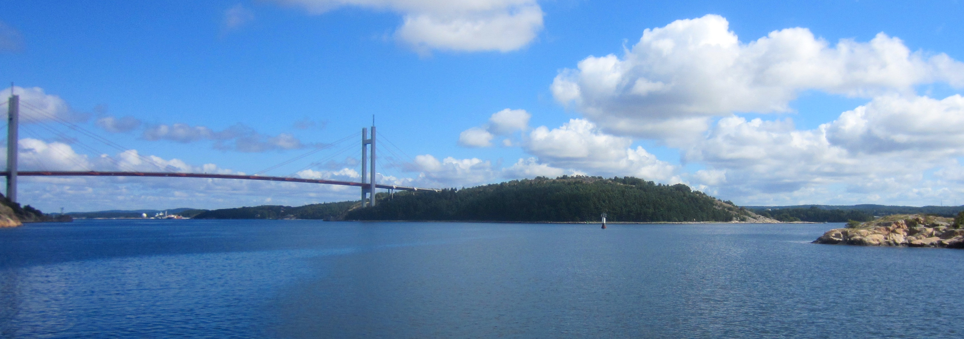 Tjörnbrons västra del mellan Almön i väster och Källön i öster.